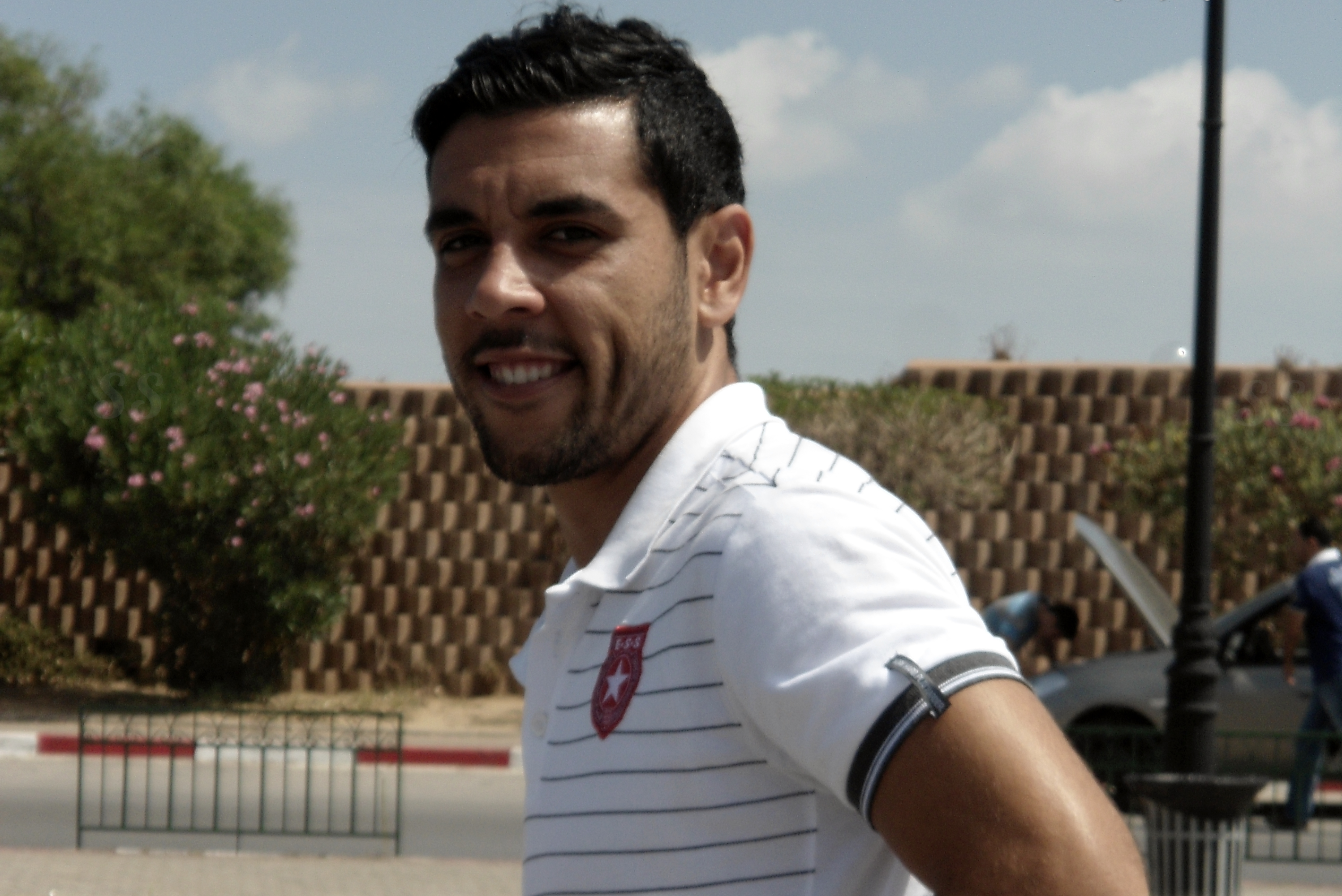 Alaya Brigui Photo